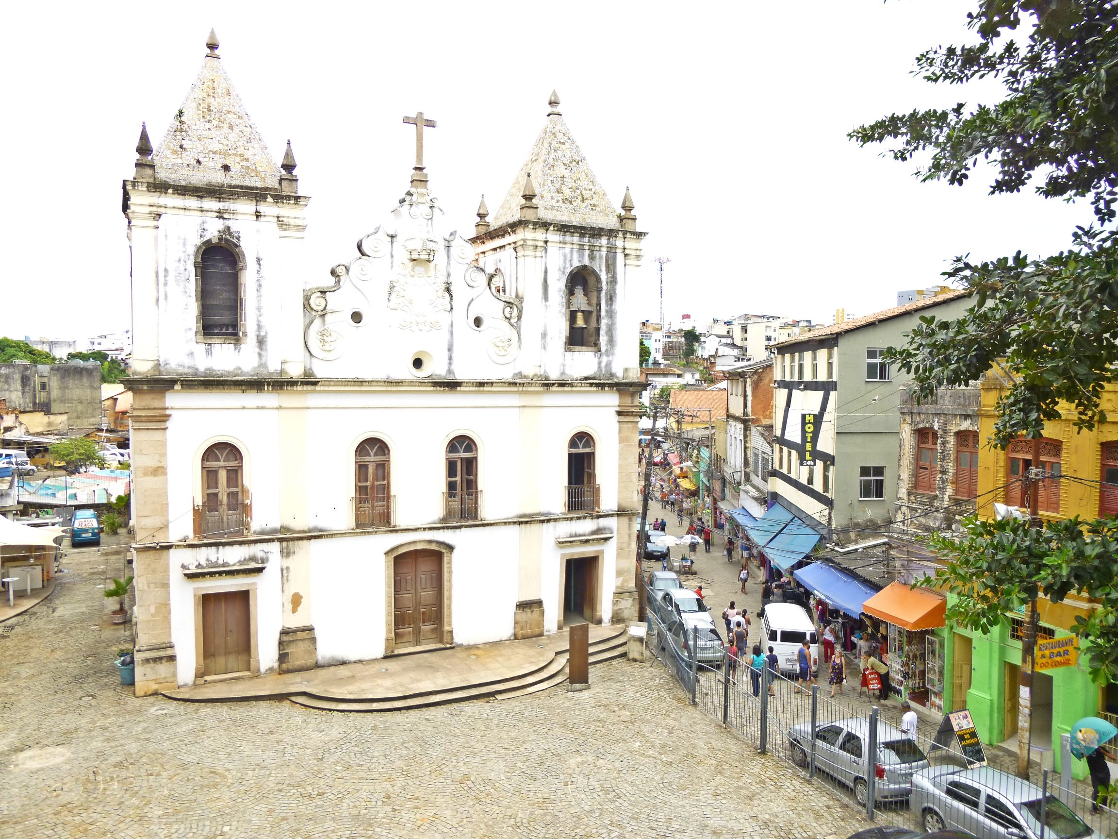 Igreja da Barroquina Salvador Bahia